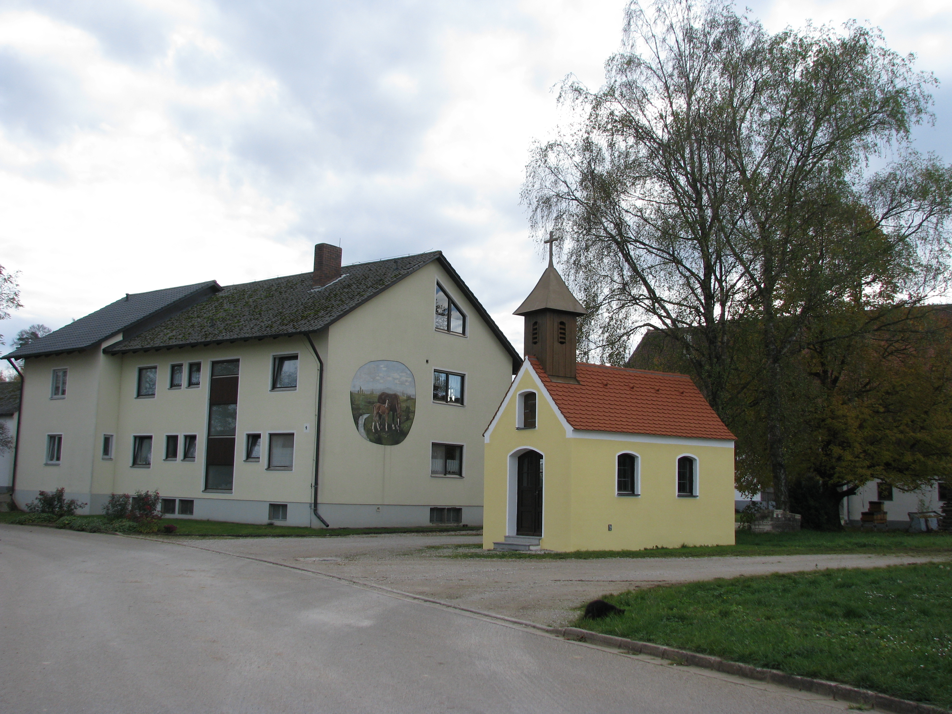 Birkhof, Ortsteil von Greding im mittelfränkischen Landkreis Roth in Bayern, Ortsmitte mit Ortskapelle "Maria hilf"